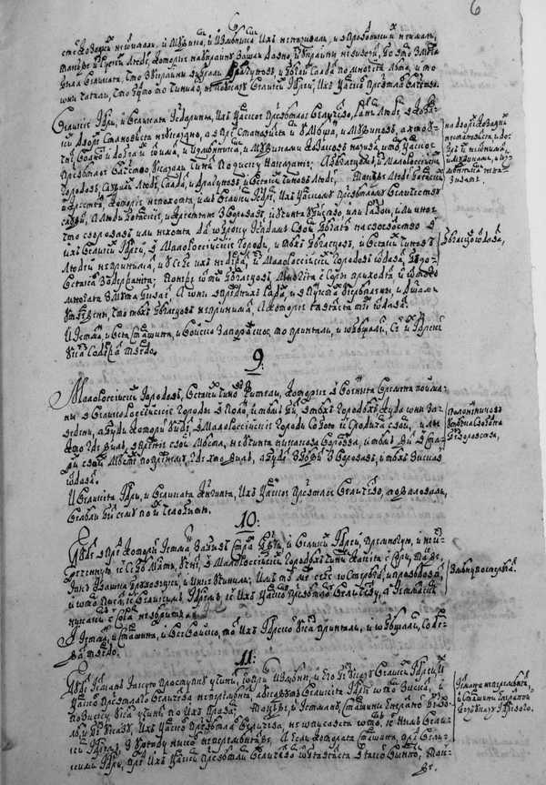 Коломацькі статті - договір, укладений між новообраним гетьманом Війська Запорозького Іваном Мазепою із старшиною та представниками московського уряду. 25 липня 1687. ЦДІАК України, ф. 220, оп. 1, спр. 210. арк. 1, 6, 6 зв.